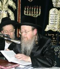 רבי תנחום בקר מאוז'רוב